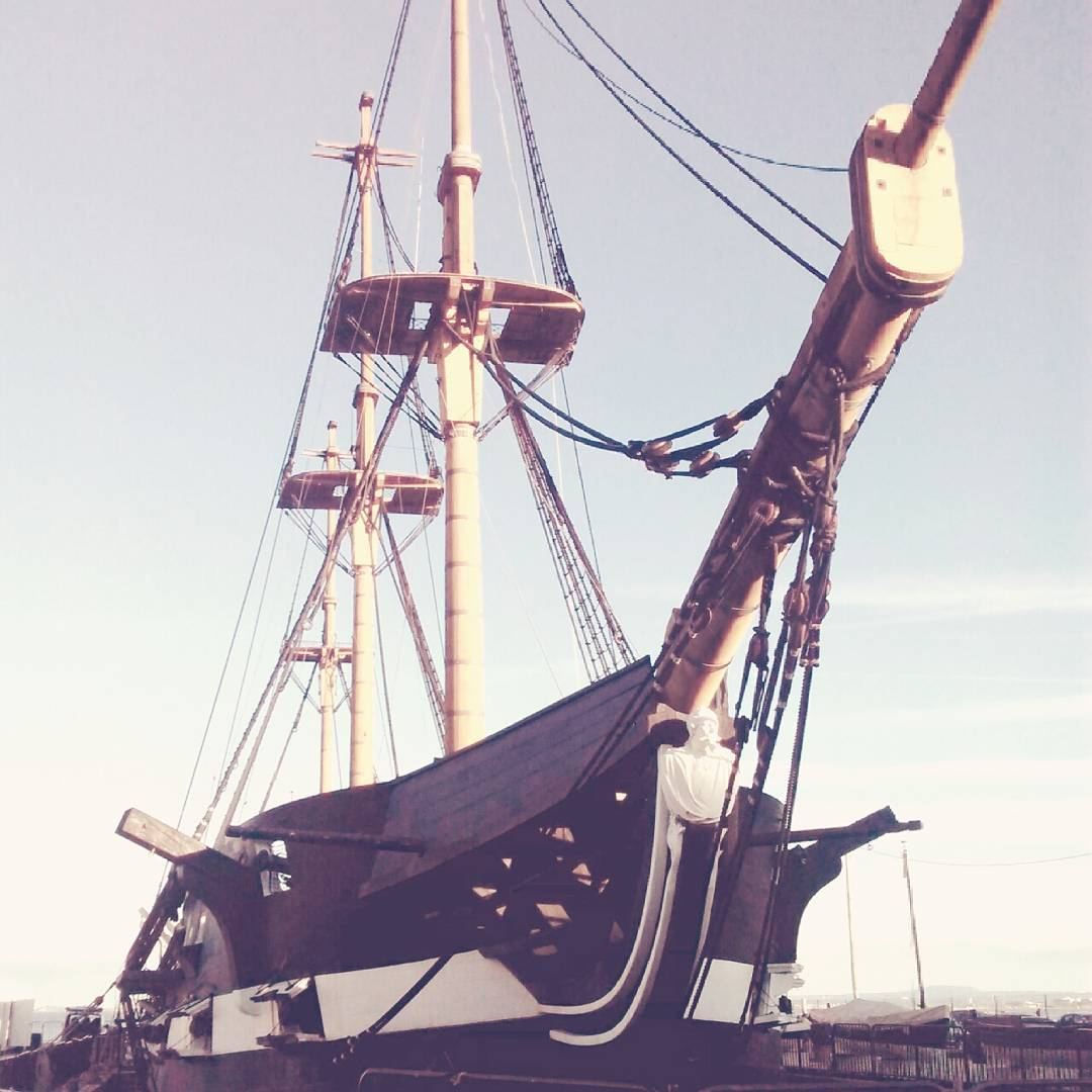 Fragata D. Fernando II e Glória - 4ª fragata de guerra mais antiga do Mundo. Cultural property Palácio da Cerca, Almada, Almada, Cova da Piedade, Pragal e Cacilhas, Almada, Setúbal District, Portugal Q9698170, VIAF ID: 167655045, SIPA ID: 2135, DGPC ID: 74207 Wiki Loves Monuments ID: DGPC-74207